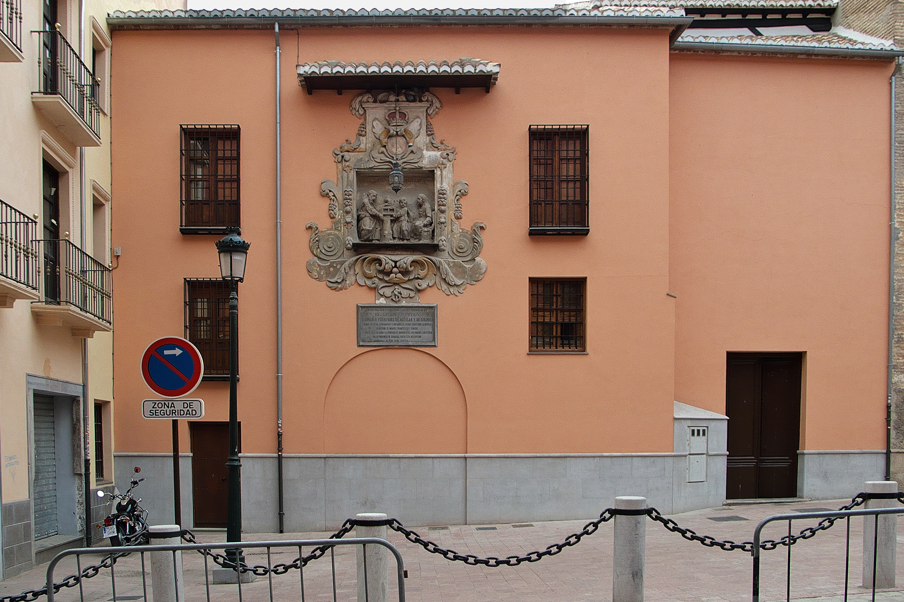 En esta casa vivió y murió Gonzalo Fernández de Aguilar y de Córdoba.